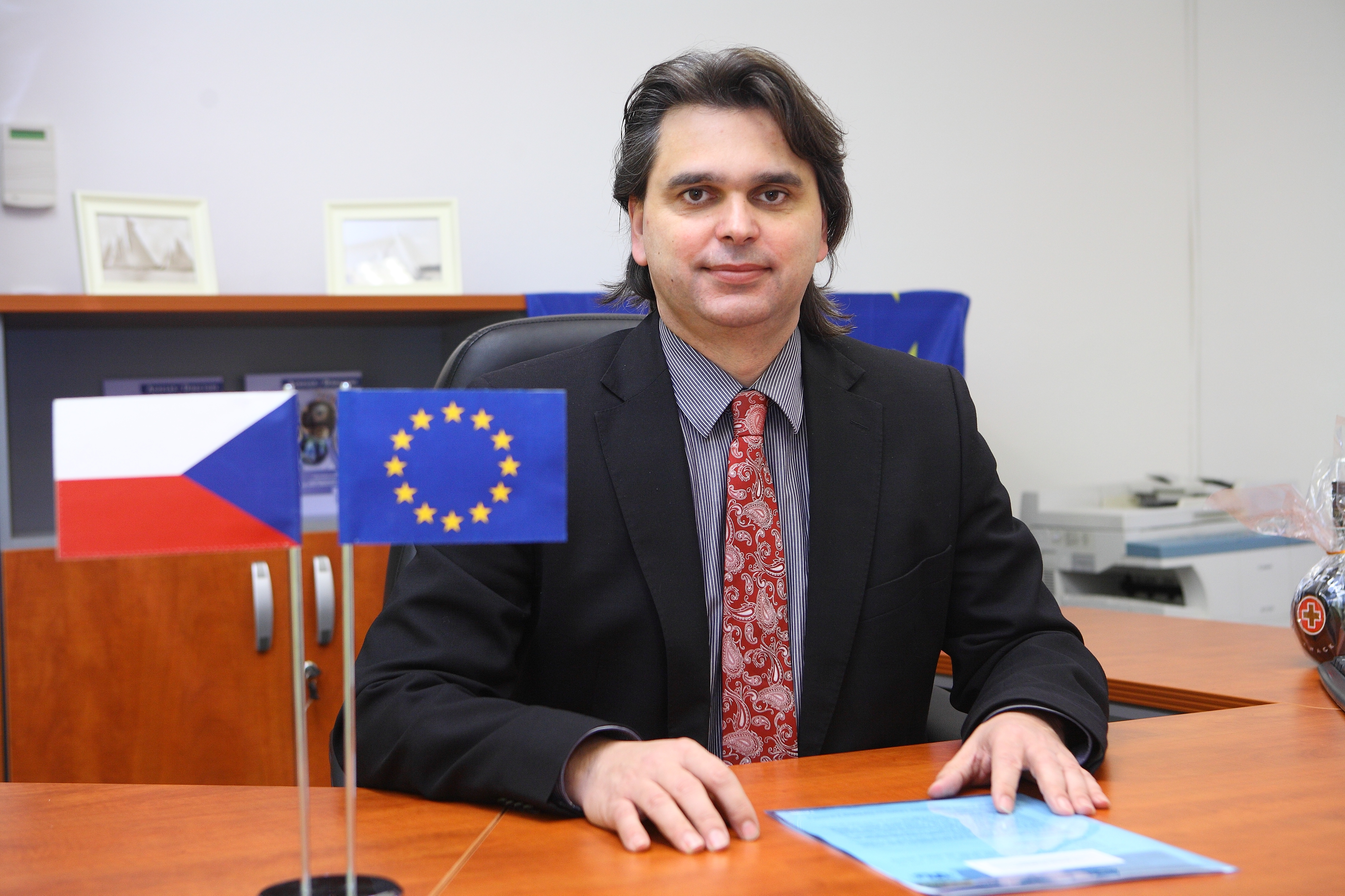 Ing. Roman Škrabánek, foto Luděk Neužil